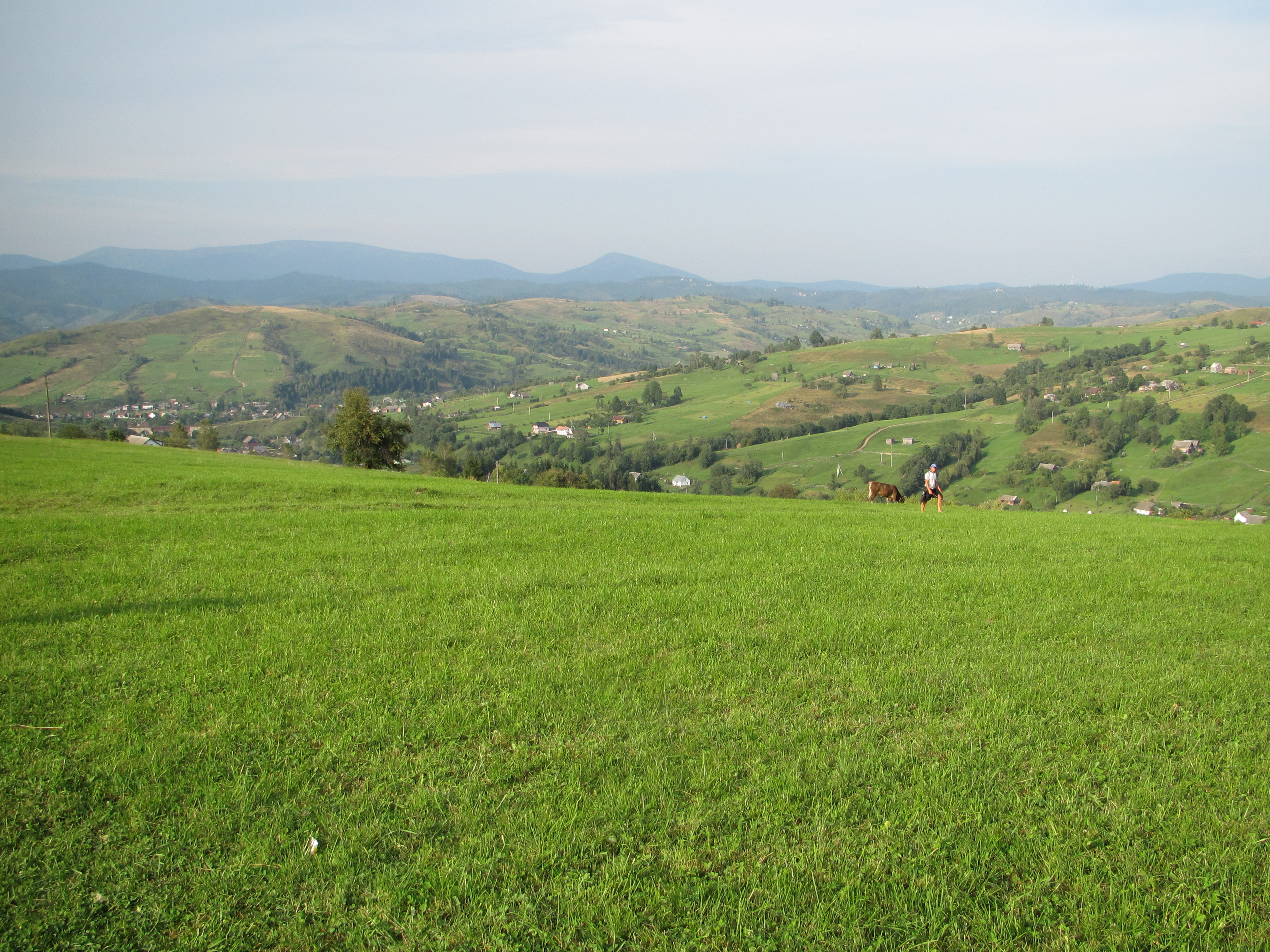 Літні Ясіня